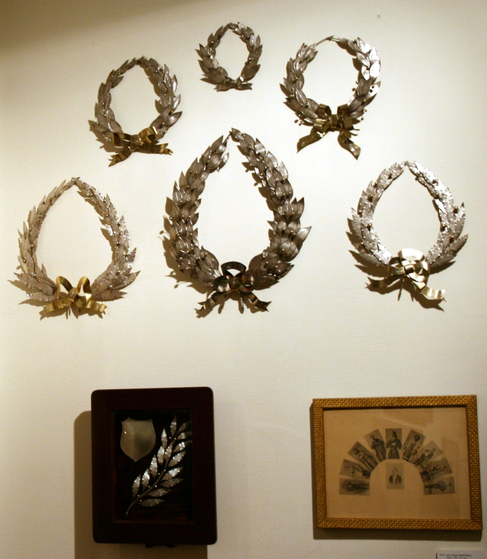 Lovor-vijenci Andriji Fijanu, 1898.-1910. godine, u Muzeju grada Zagreba snimljeni tijekom Noći muzeja